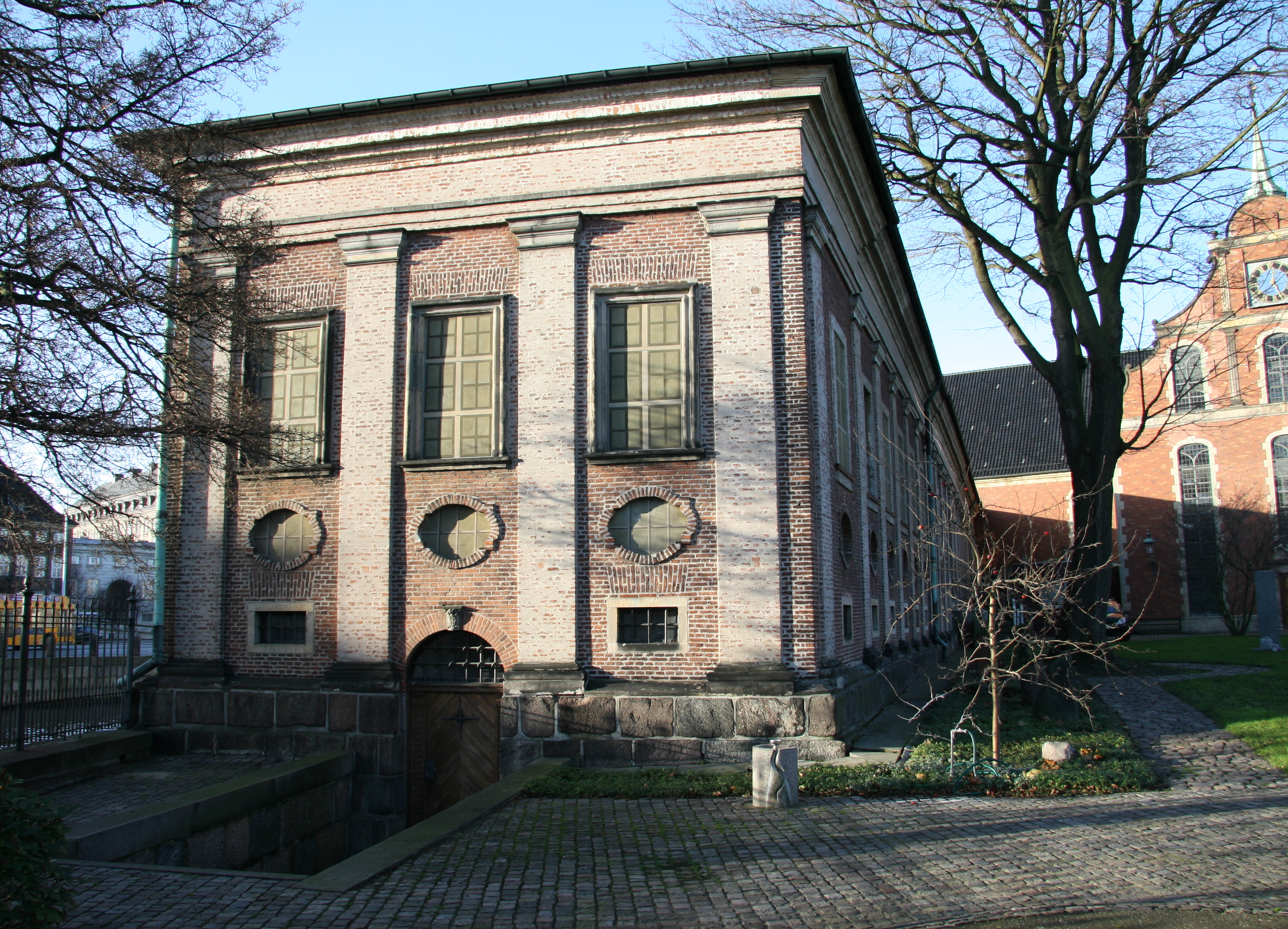 Holmens Kirke, Copenhagen, Denmark . Store kapel sydgavl.